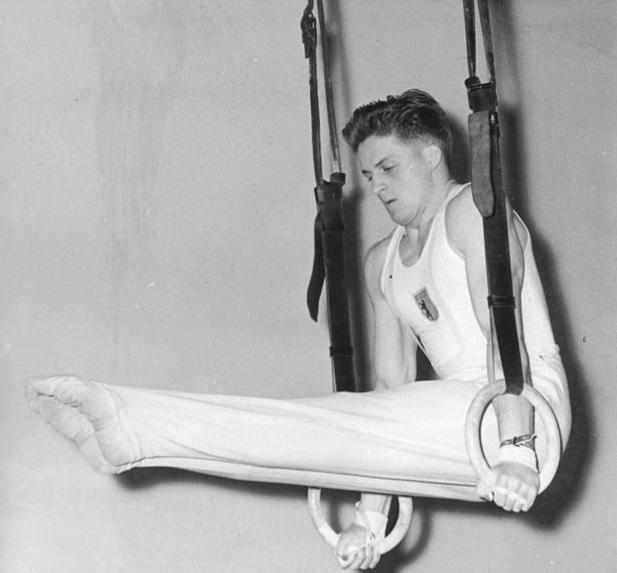 Fest Zentralbild Zastrow 13.1.1960 Spitzensportler der DDR im Turnen UBz: Fest (Lokomotive Leipzig).